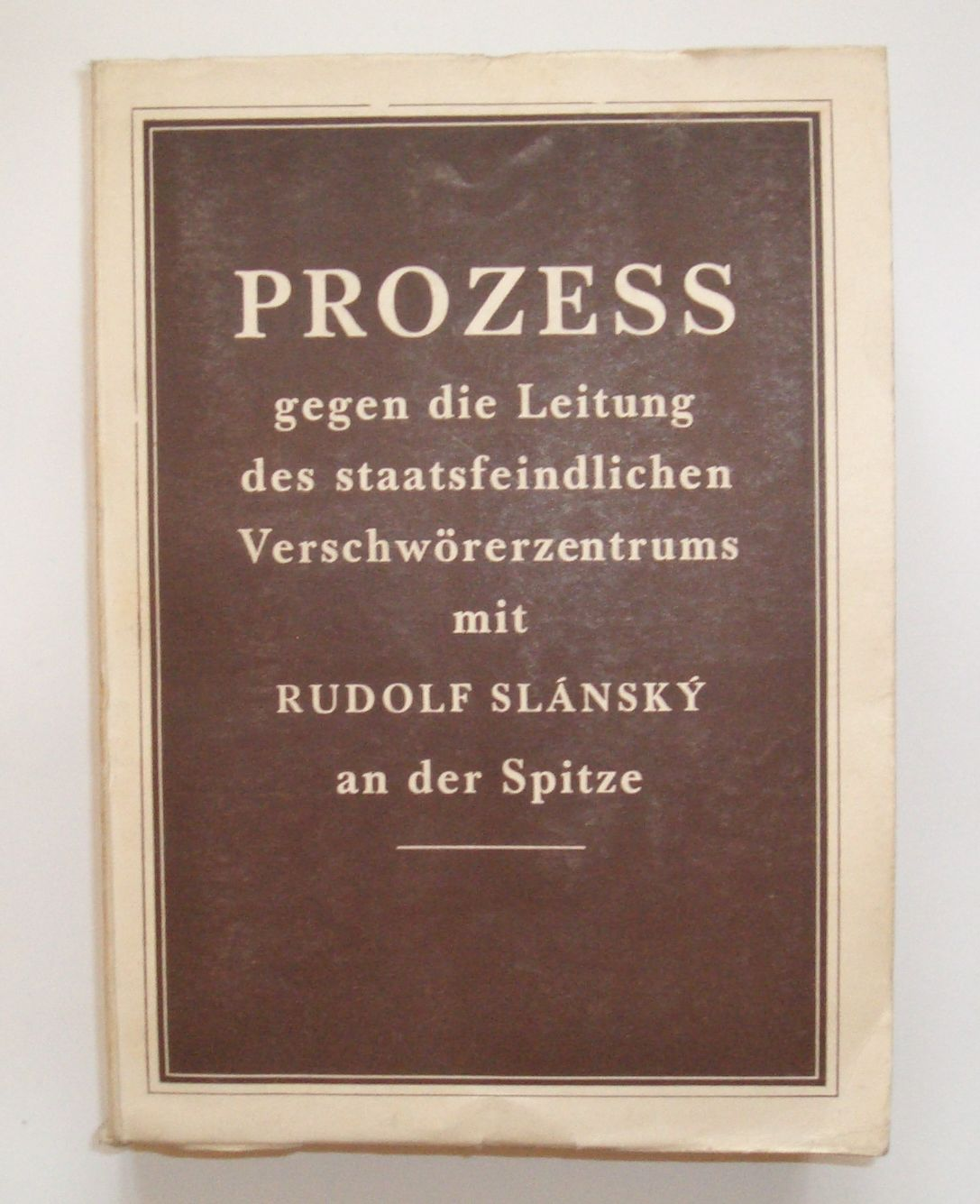 Prozeß gegen die Leitung des staatsfeindlichen Verschwörerzentrums mit Rudolf Slánský an der Spitze. Gerichtsprotokoll in der Strafsache gegen die Leitung des staatsfeindlichen Verschwörerzentrums, die vor dem Senat des Staatsgerichts in Prag in der Zeit vom 20. bis 27. November 1952 gegen Rudolf Slánský, Bedřich Geminder, Ludvík Frejka, Josef Frank, Vladimír Clementis, Bedřich Reicin, Karel Šváb, Artur London, Vavro Hajdů, Evžen Löbl, Rudolf Margolius, Otto Fischl, Otto Šling und André Simone wegen der Straftaten des Hochverrats, der Spionage, der Sabotage und des Militärverrats verhandelt wurde. Justizministerium (Prag), 1953. 667 Seiten. (this protocol was published in at least 7 languages)